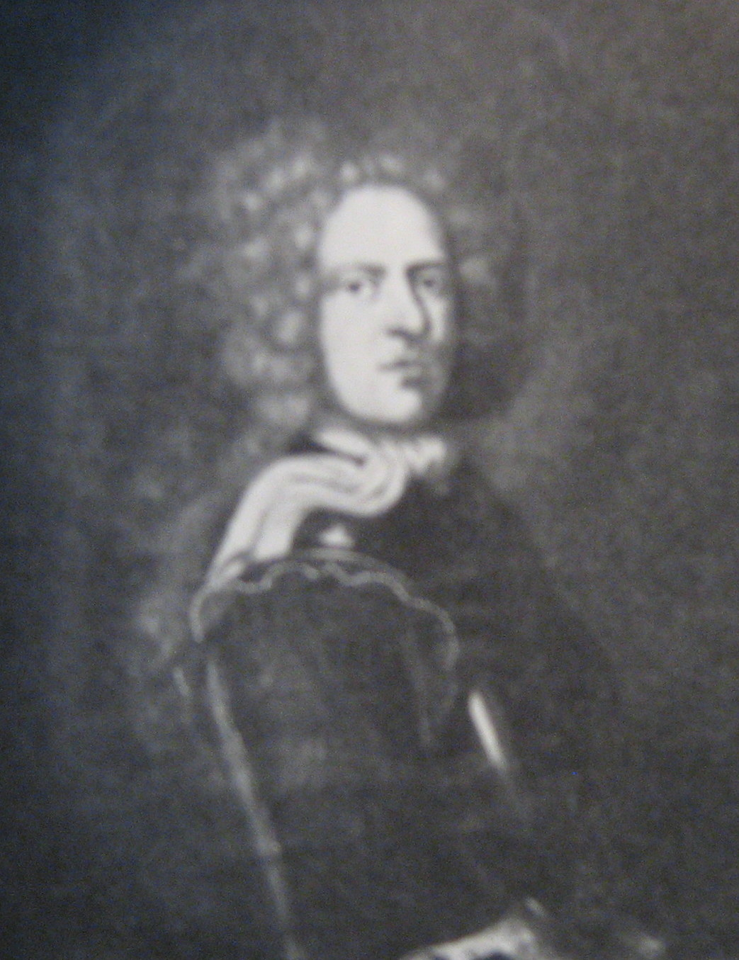 Oljemålning av Gustaf Kruus af Gudhem (1649-1692)